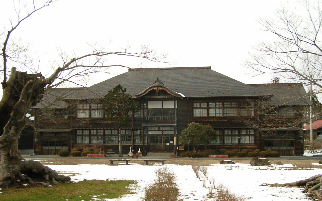 Kurihara City Kannari History Musium. Kurihara, Miyagi prefecture, Japan.